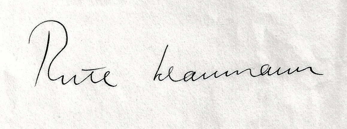 Unterschrift eines Briefes von Ruth Schaaumann an meinen Vater Erich Wewel vom 2.März 1937